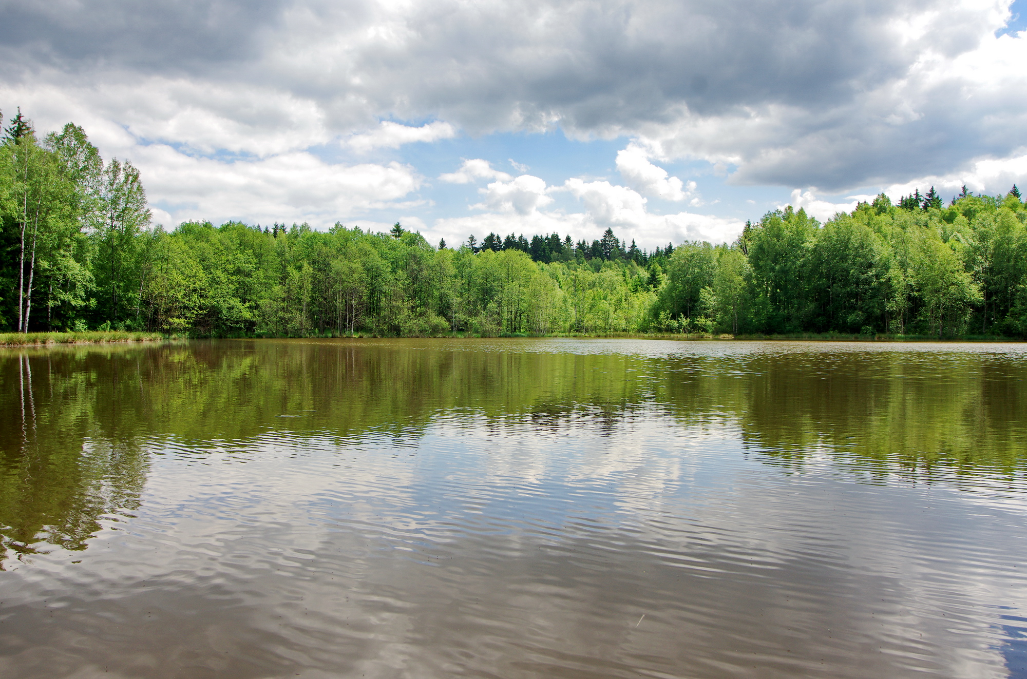 Evropsky významná lokalita Štítarský rybník, okres Cheb